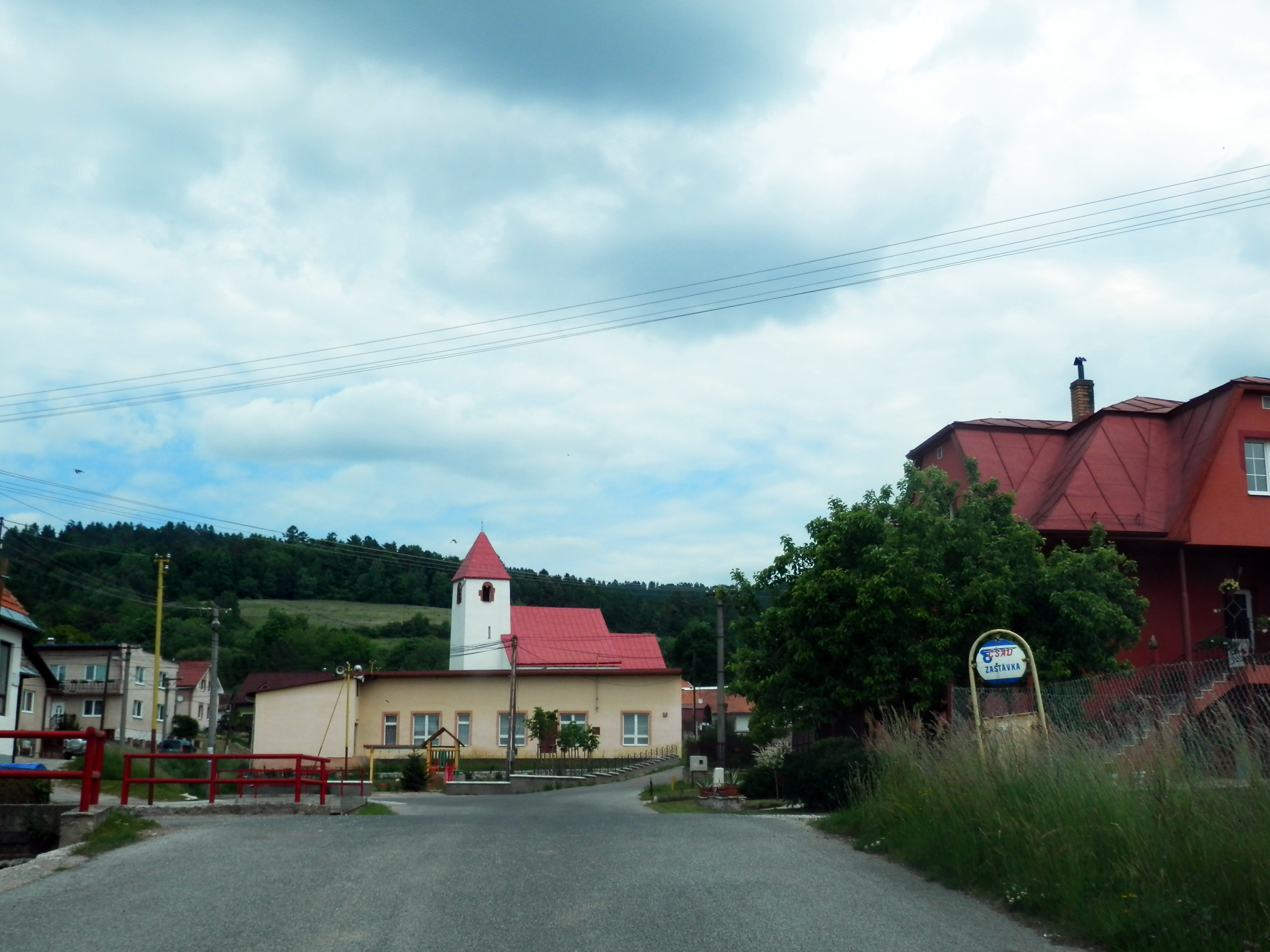 Intravilán obce Pongrácovce, okres Levoča.